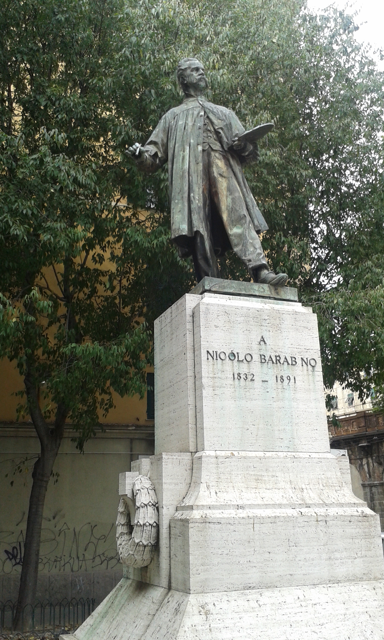 Genova-Sampierdarena, monumento al pittore Nicolò Barabino di Augusto Rivalta This is a photo of a monument which is part of cultural heritage of Italy.